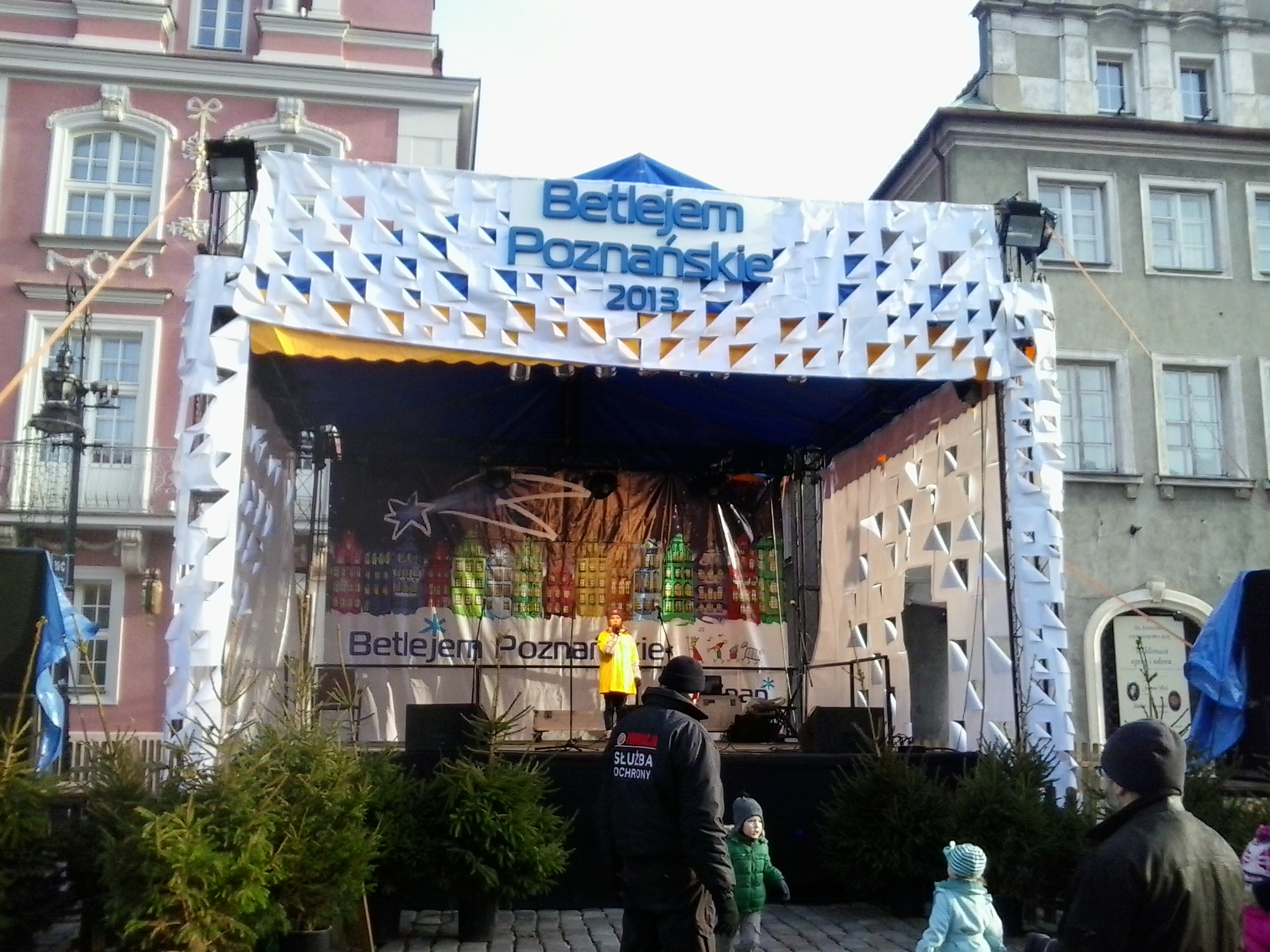 Betlejem Poznańskie w 2013r. (Stary Rynek).